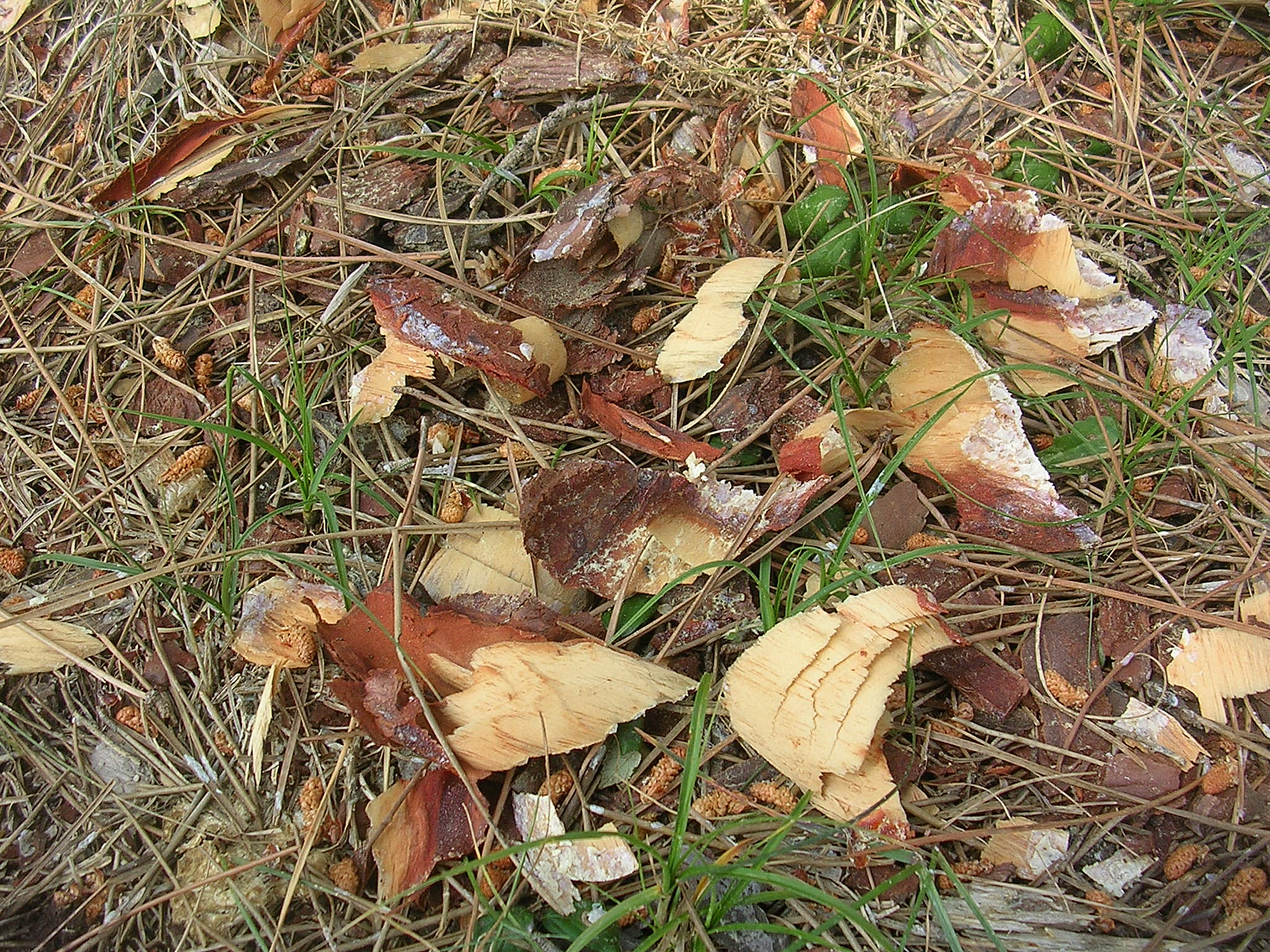 Galips au pied d'un pin gemmé de la ferme de Leslurges, à Mimizan-Plage, dans le département français des Landes